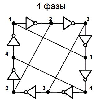 ring oscillator 5